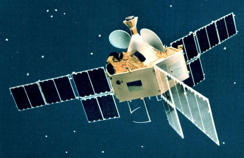 Description Photo maquette Symphonie2 Date1974SourceDe Jean-Jacques DechezellesAuthorŒuvre personnelle Jean-Jacques Dechezelles Kasos--Cordialement, kasos 1 juillet 2007 à 12:18 (CEST) Catégorie:Industrie spatiale Photo maquette Symphonie2